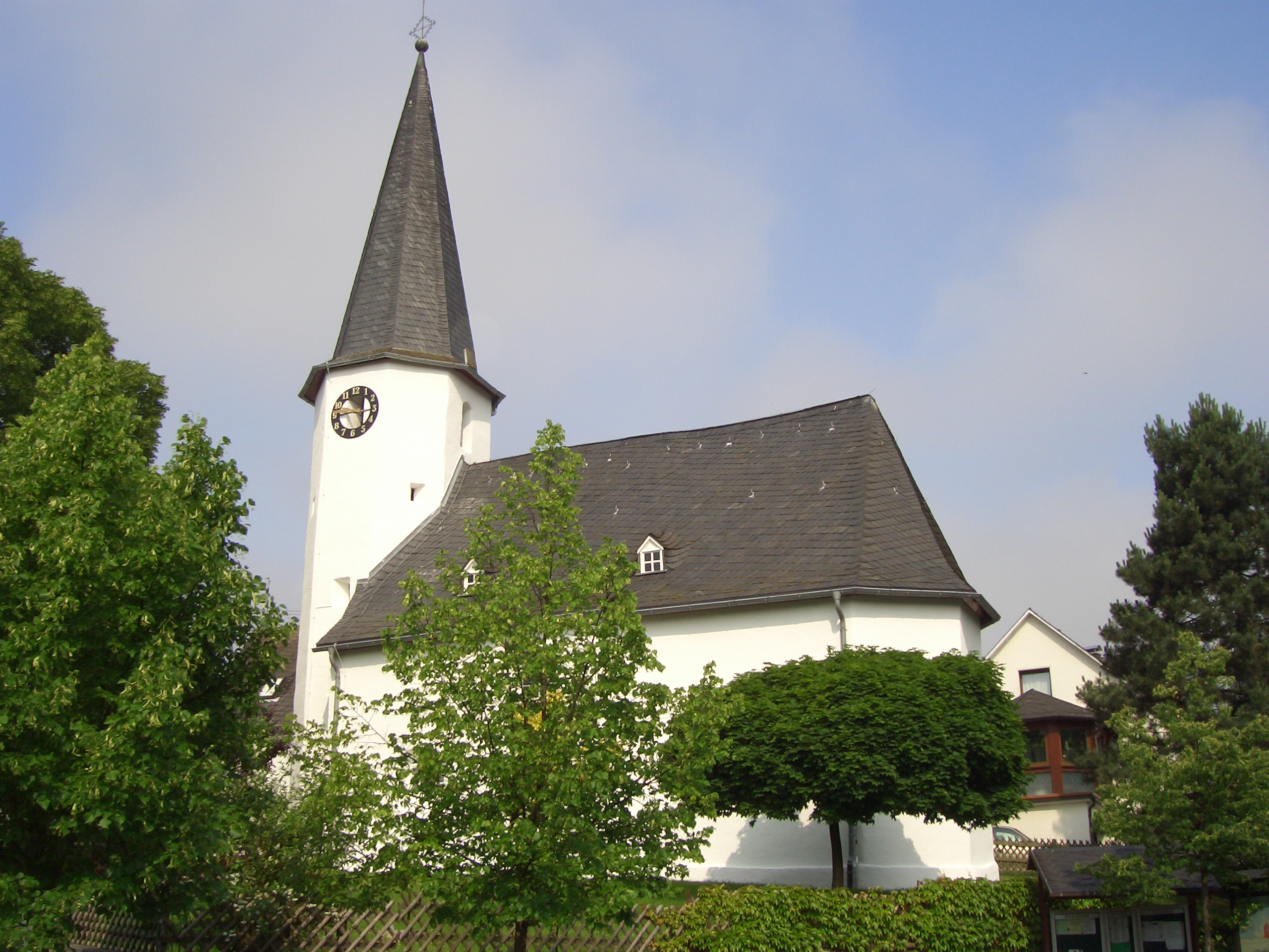 900 Jahre alte Wehrkirche in Würgendorf